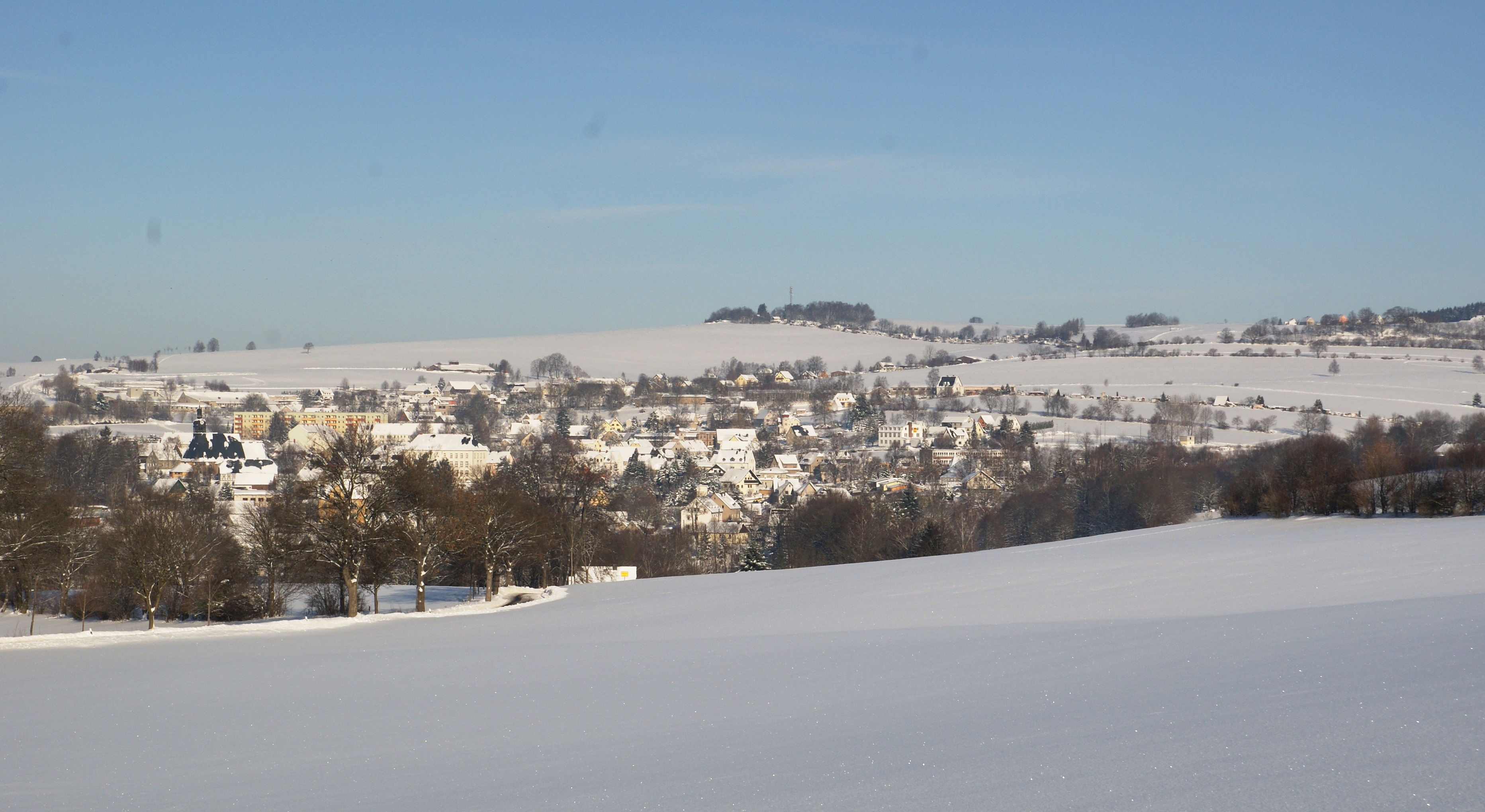 Großolbersdorf